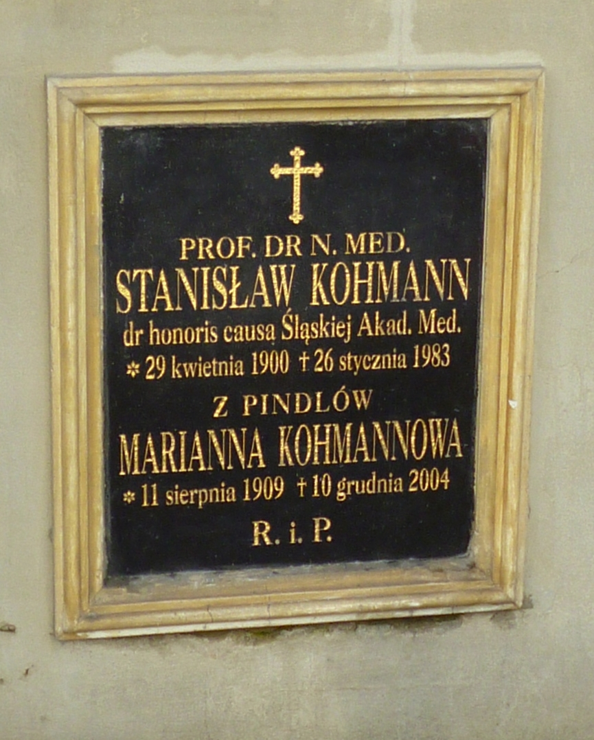 Stanisław Wilhelm Kohmann, profesor anatomii Uniwersytetu Jagiellońskiego, Śląskiego Uniwersytet Medycznego. Tablica na grobowcu w Grybowie.